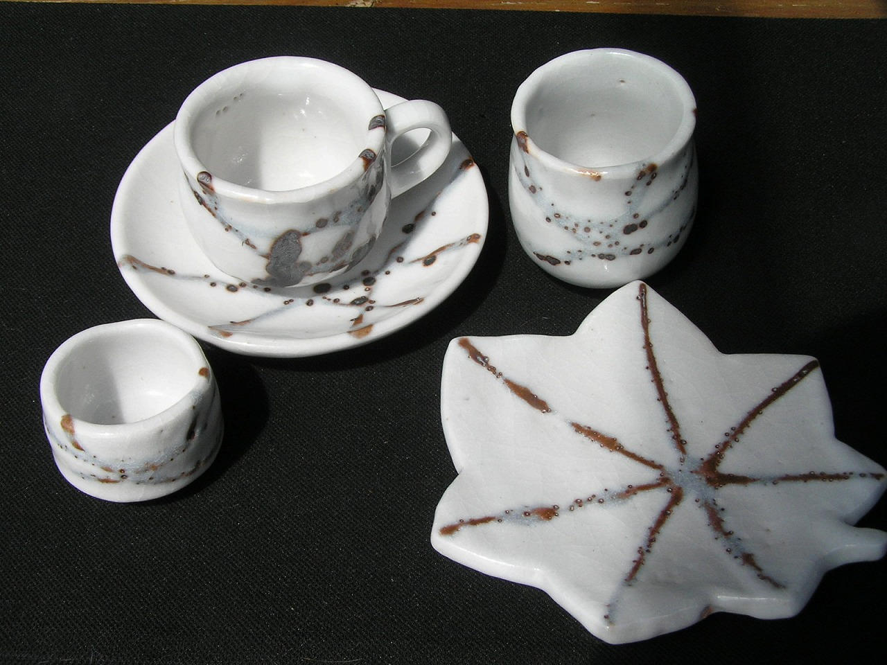 雪志野（ゆきしの）とは、美濃焼の一種である志野焼の窯元の一つである岐阜県土岐市土岐津町高山の桔梗屋窯桑原小三郎作の陶磁器の銘の一つである。 志野釉を使い、雪を思わせる真っ白な地にわずかに滲みあがるような簡潔で抽象的かつ暖かみのある素朴なデザインを特徴とする。釉薬は長石が主でたっぷりと厚く施釉される。茶器、茶碗、皿、鉢、花瓶、壺などが造られている。